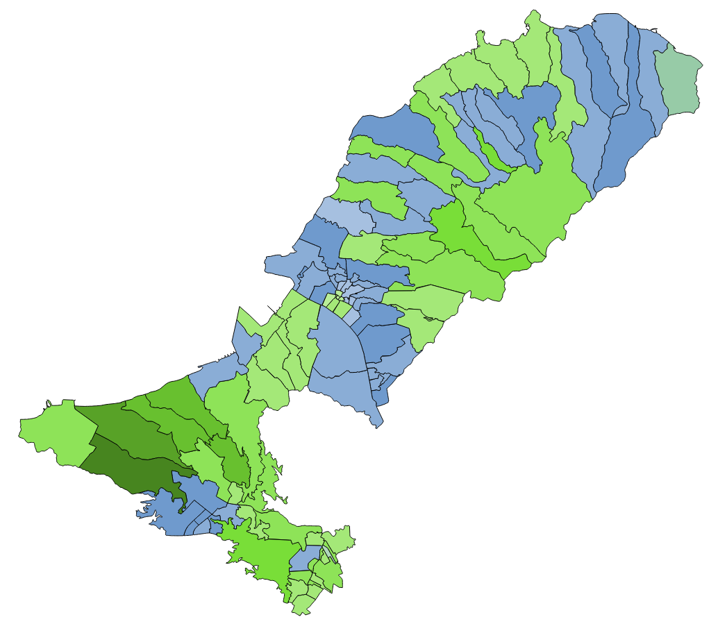 顏色對照表